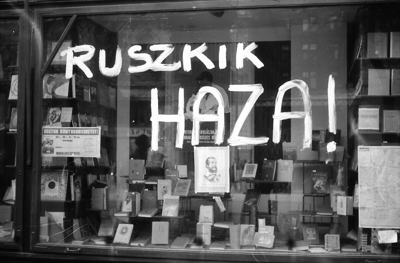 Erzsébet (Lenin) körút, a Royal Szállóval (ma Corinthia Hotel) szemben. Location: Hungary, Budapest VII. Tags: Show window, label, book store, Budapest, revolution Title: Erzsébet (Lenin) körút, a Royal Szállóval (ma Corinthia Hotel) szemben.